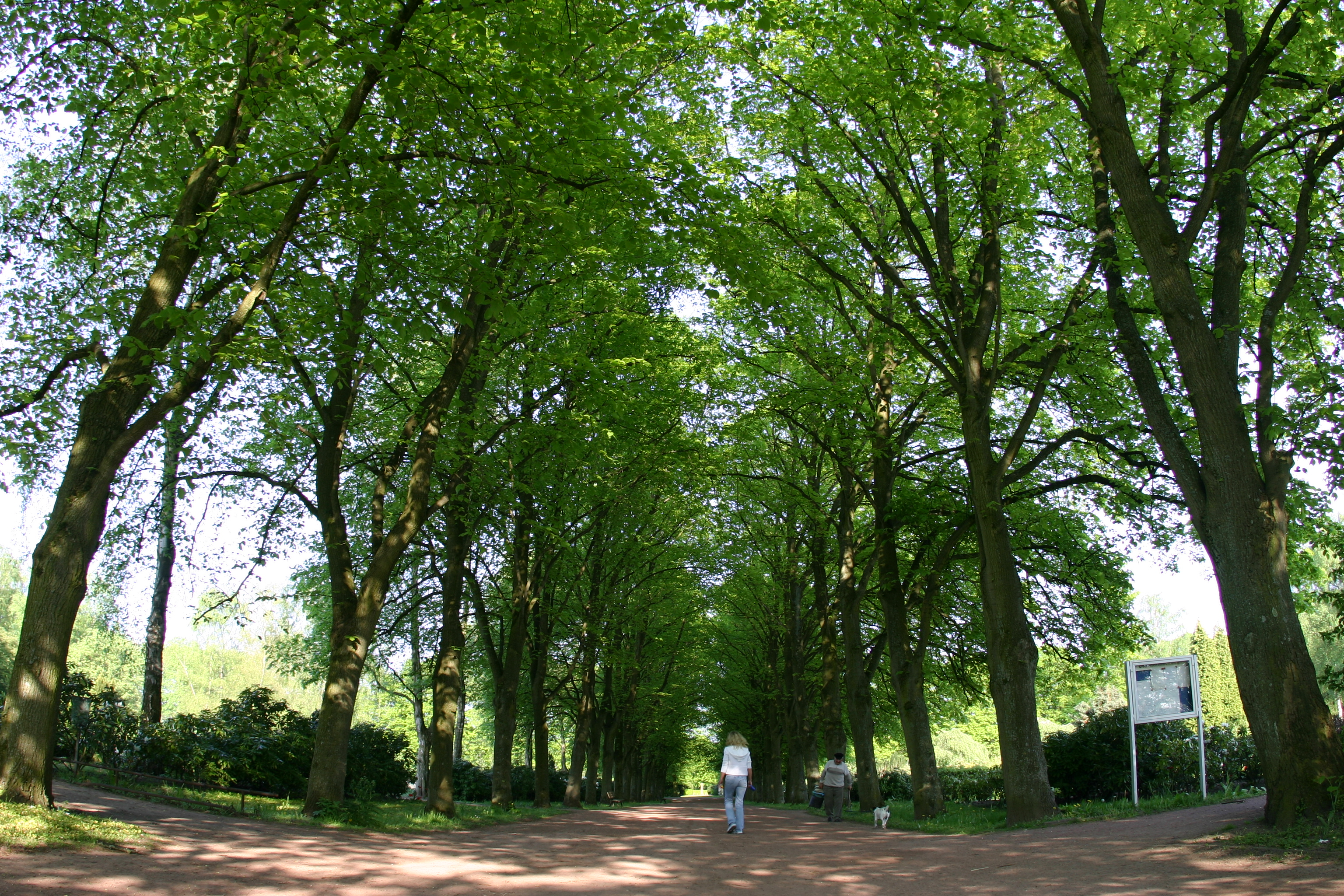 Allee auf dem friedhof Tholenswehr, einem Stadtteil von Emden, Ostfriesland, Niedersachsen